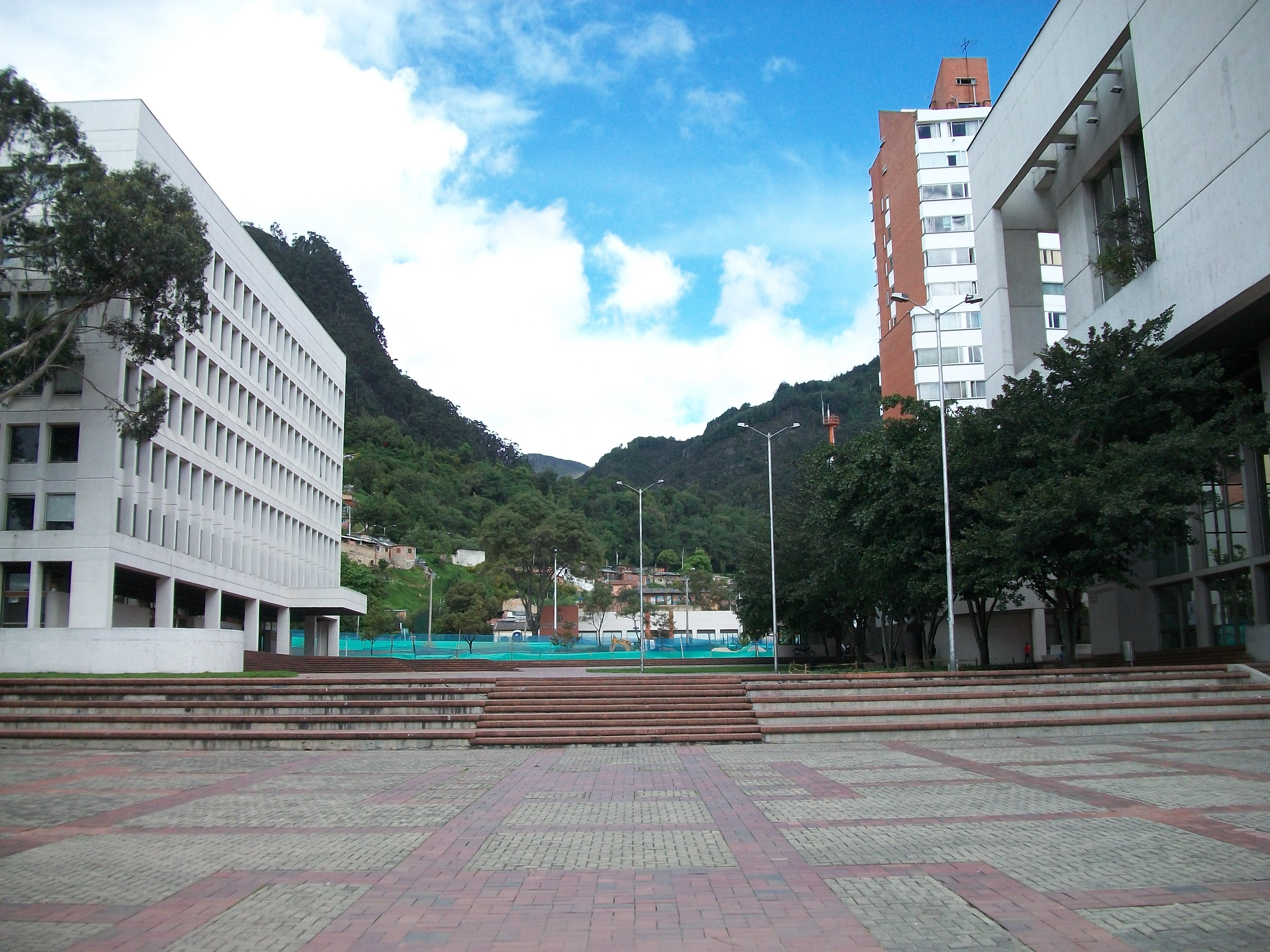 Plaza de la Universidad Jorge Tadeo Lozano, con la zona sur del cerro de Monserrate al fondo.